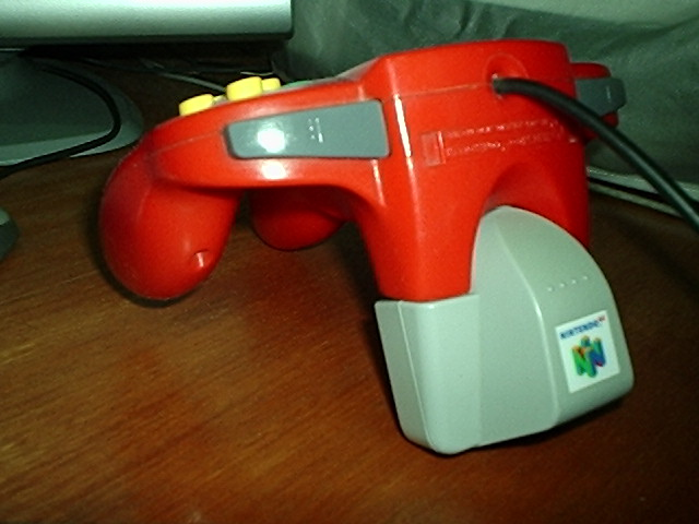 Acessório Rumble Pak acoplado com um controle do Nintendo 64.